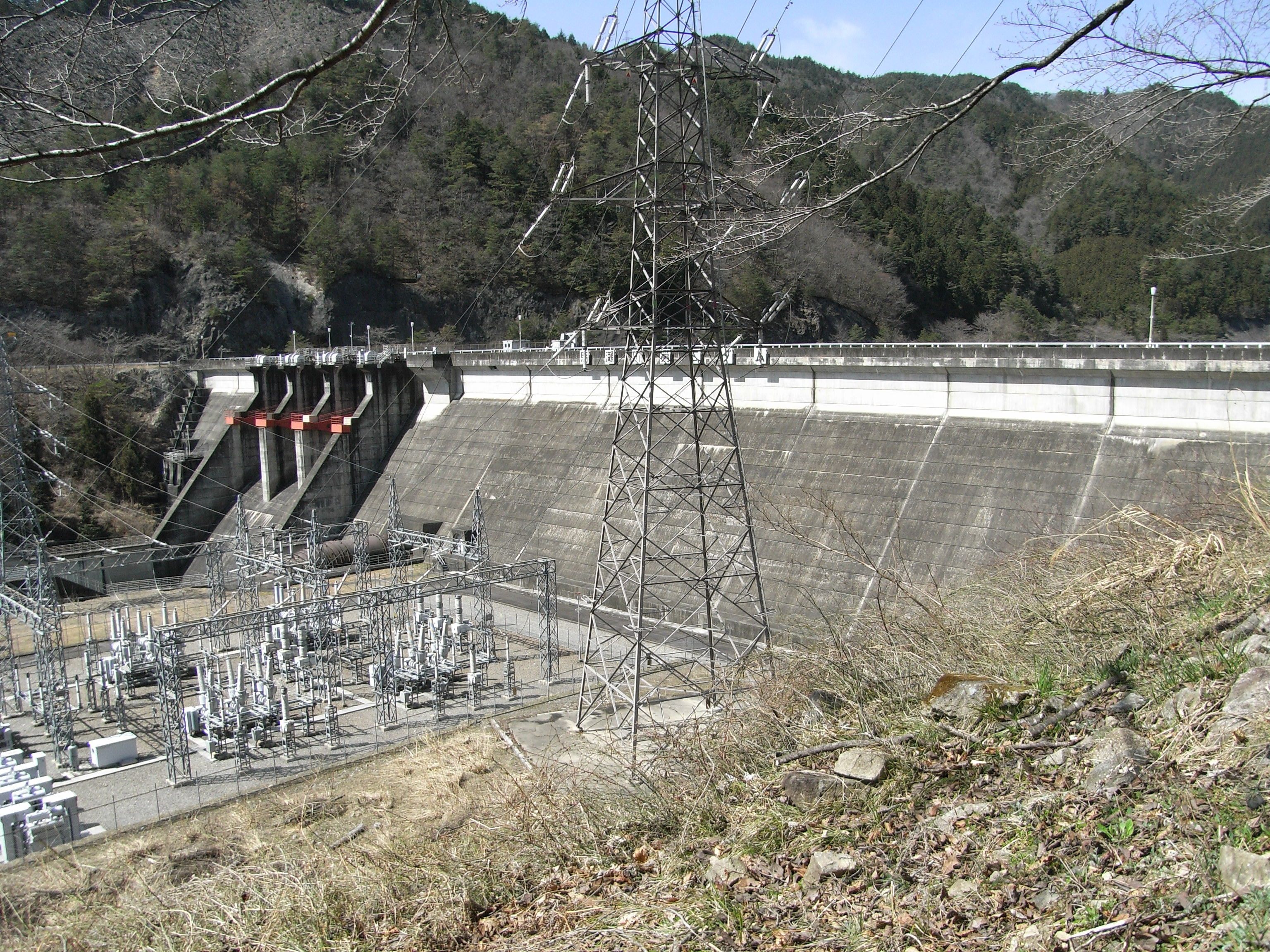 Dam